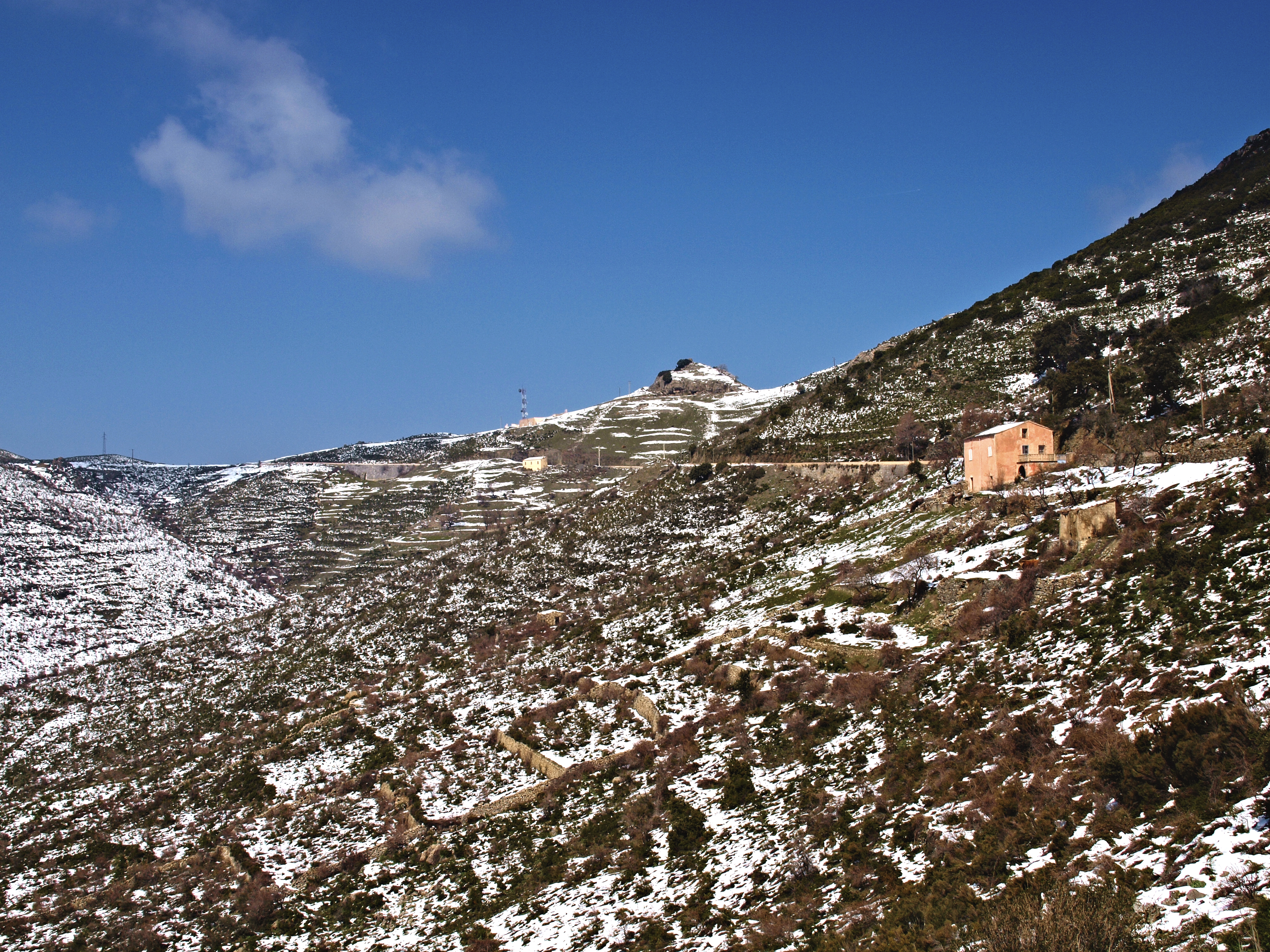 Palasca (Corsica) - Col de San Colombano, limite du P.N.R.C.